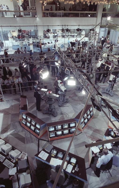 ADN-ZB Schindler / 18.3.90/ Berlin: Wahl 90 Blick in den Palast der Republik, aus dem in- und ausländische Fernsehjournalisten über Wahl in der DDR berichten.